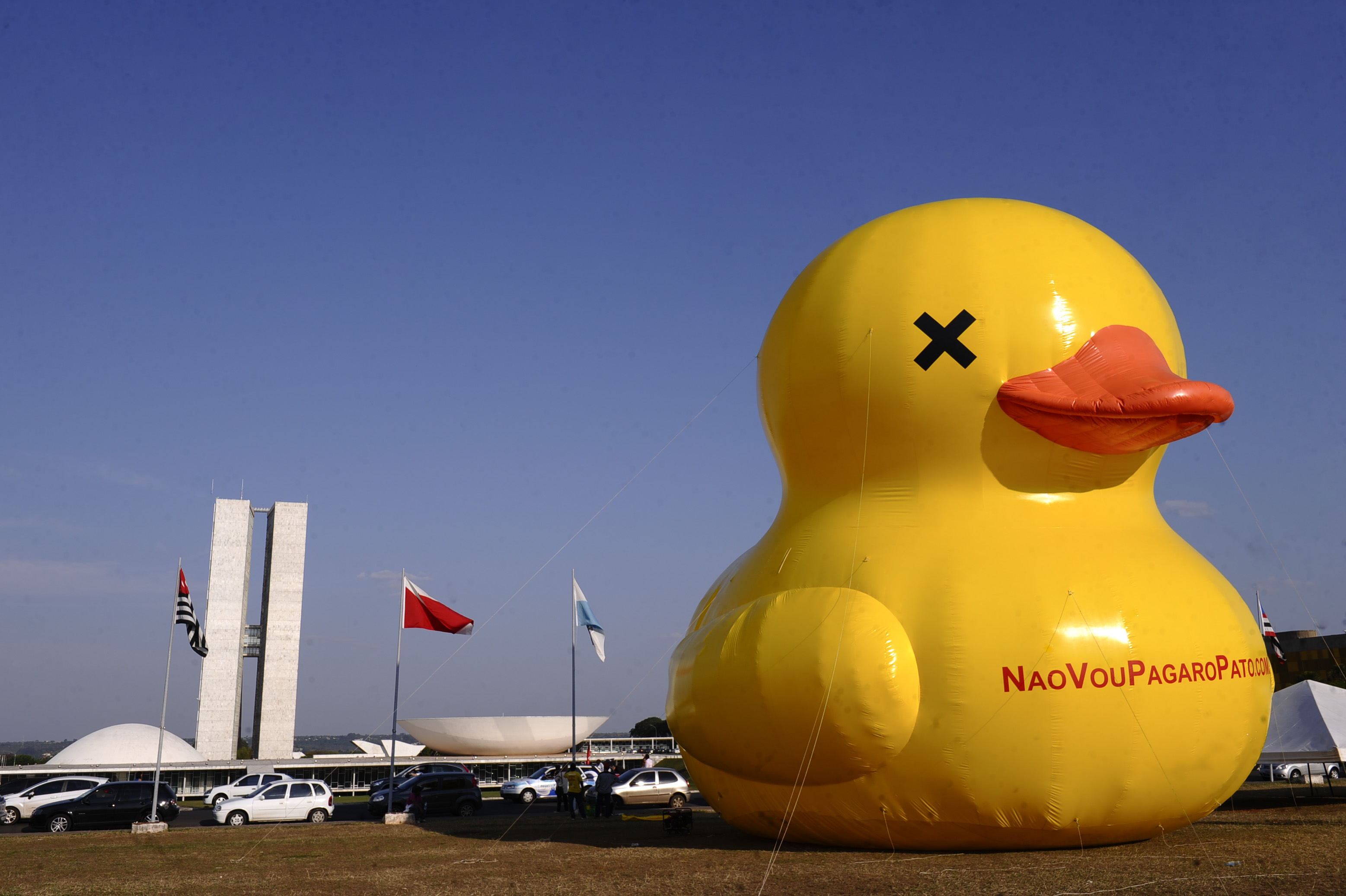 Contra aumento de impostos e CPMF, Fiesp pÃµe pato inflÃ¡vel na Esplanada dos MinistÃ©rios. A FederaÃ§Ã£o das IndÃºstrias de SÃ£o Paulo instalou nesta quinta-feira (1Âº) um pato inflÃ¡vel de 12 metros de altura no canteiro central da Esplanada dos MinistÃ©rios, em frente ao Congresso Nacional, em BrasÃ-lia, em um ato contra o aumento de impostos e a volta da CPMF. Foto: Marcos Oliveira/AgÃªncia Senado